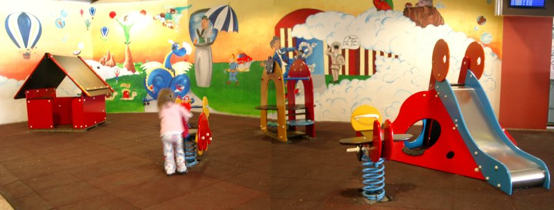 Spielplatz innerhalb des Flughafens von La Palma. Fotografiert im Juni 2006. Das besondere daran ist, daß sich dieser Spielplatz innerhalb des Flughafengebäudes (im OG) befindet. Die Palmeros sind besonders kinderfreundlich.